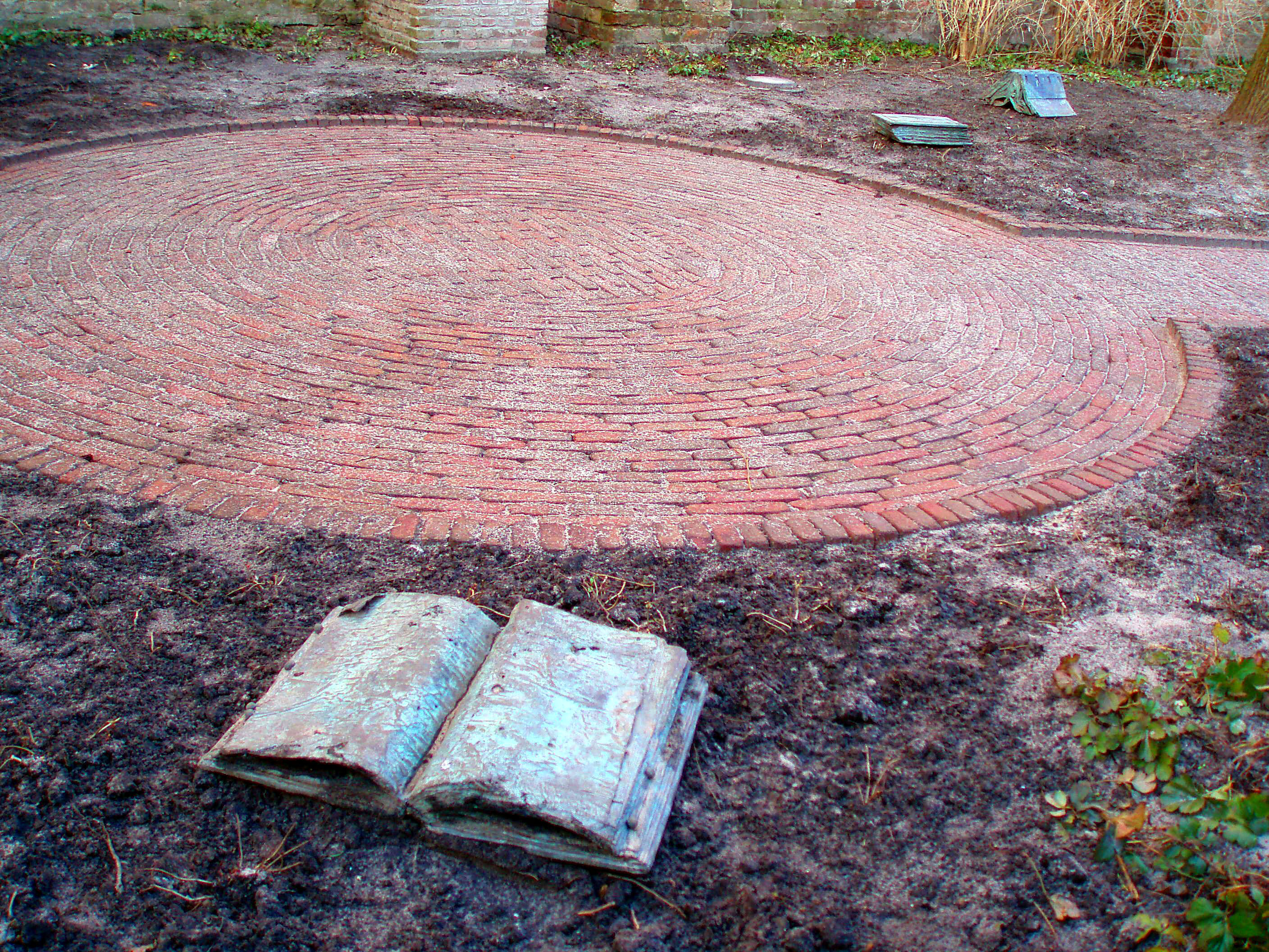 Groenewoud & Buij, 1998: Fons et Origo (Bron en oorsprong)Geplaatst in het kader van het kunstproject "Verborgen verleden" n.a.v. de herinrichting van de Dokkumer binnenstad. Het kunstwerk bestaat uit 16 bronzen boeken die, willekeurig over de terp verspreid, ter aarde geworpen zijn. De boeken zijn gevormd naar replica's van boeken uit de tijd van Bonifatius (in 754 bij Dokkum vermoord) en zijn op ware grootte: 7 folianten, 5 middelgrote boeken en 4 brevieren. Ze verbeelden het dramatische moment waarop de moordenaars - op zoek naar goud en zilver - de werkelijke schat van Bonifatius, zijn bibliotheek, die hij overal met zich mee nam, aantreffen en teleurgesteld de kostbare boeken van zich af werpen. Daarnaast is de terp in zijn geheel beplant met de bodembedekker 'Erdblut' (Sedum Spurium), een plant die in de loop van het jaar van groen naar diep rood verkleurt. De boeken zweven als het ware net boven dit ca.10 cm hoge plantje, dat de sfeer van kwelders, begroeiing op de rand van zoet en zout water oproept. Informatie en foto ter beschikking gesteld door Keunstwurk